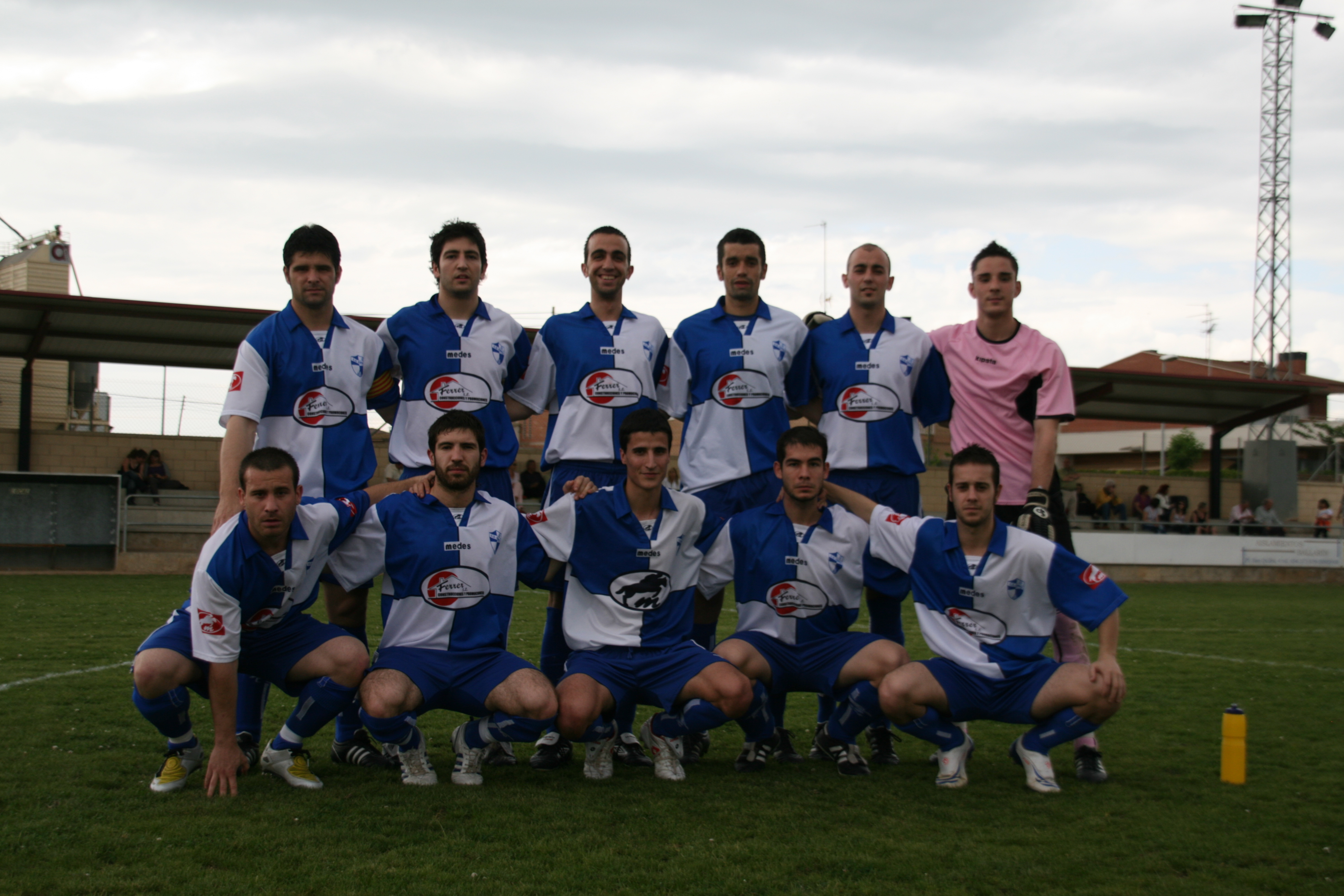 CD Ebro